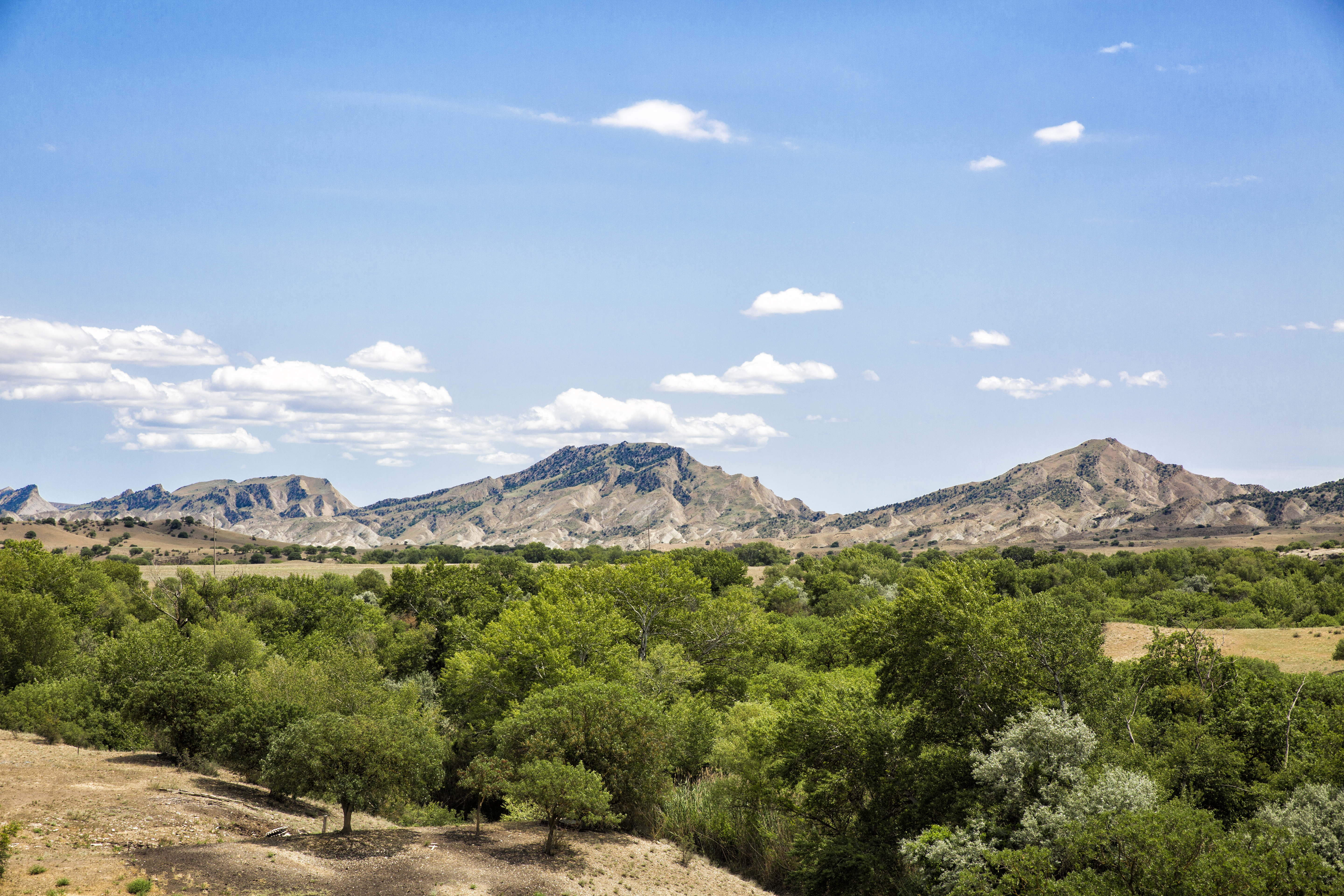 ჭაჭუნის აღკვეთილი – აღკვეთილი საქართველოში, მდებარეობს დედოფლისწყაროს მუნიციპალიტეტში, ისტორიულ ქიზიყში. წარმოადგენს წარსულში ჭაჭუნის სახელმწიფო სატყეო მეურნეობის ბაზაზე დაარსებულ დაცულ ტერიტორიას. აღკვეთილის საერთო ტერიტორია 5200 ჰექტარია და იგი თბილისიდან 175 კილომეტრითაა დაშორებული.